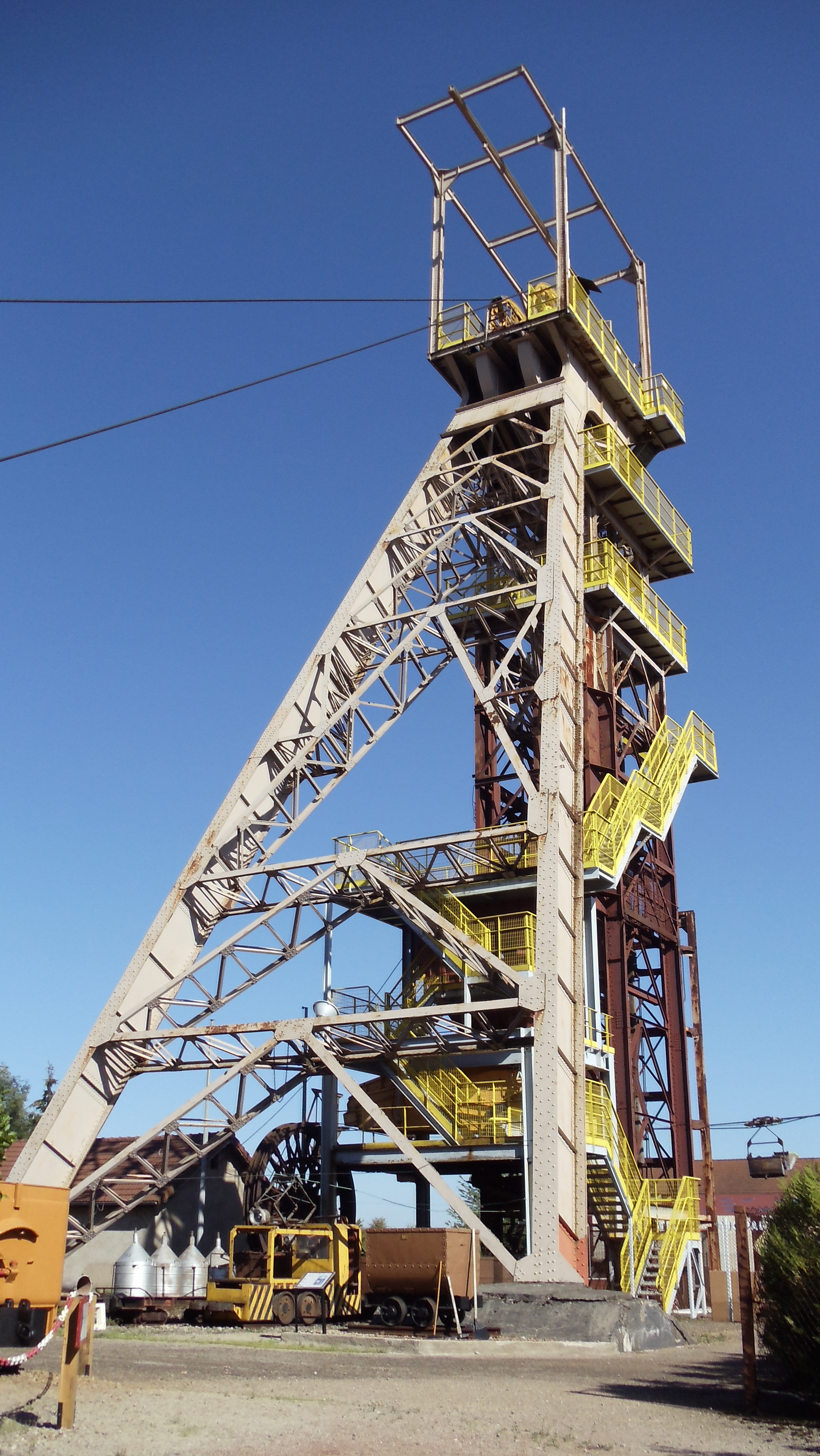 Le chevalement de la mine de fer d'Aumetz, dernier de ces mines en Lorraine.